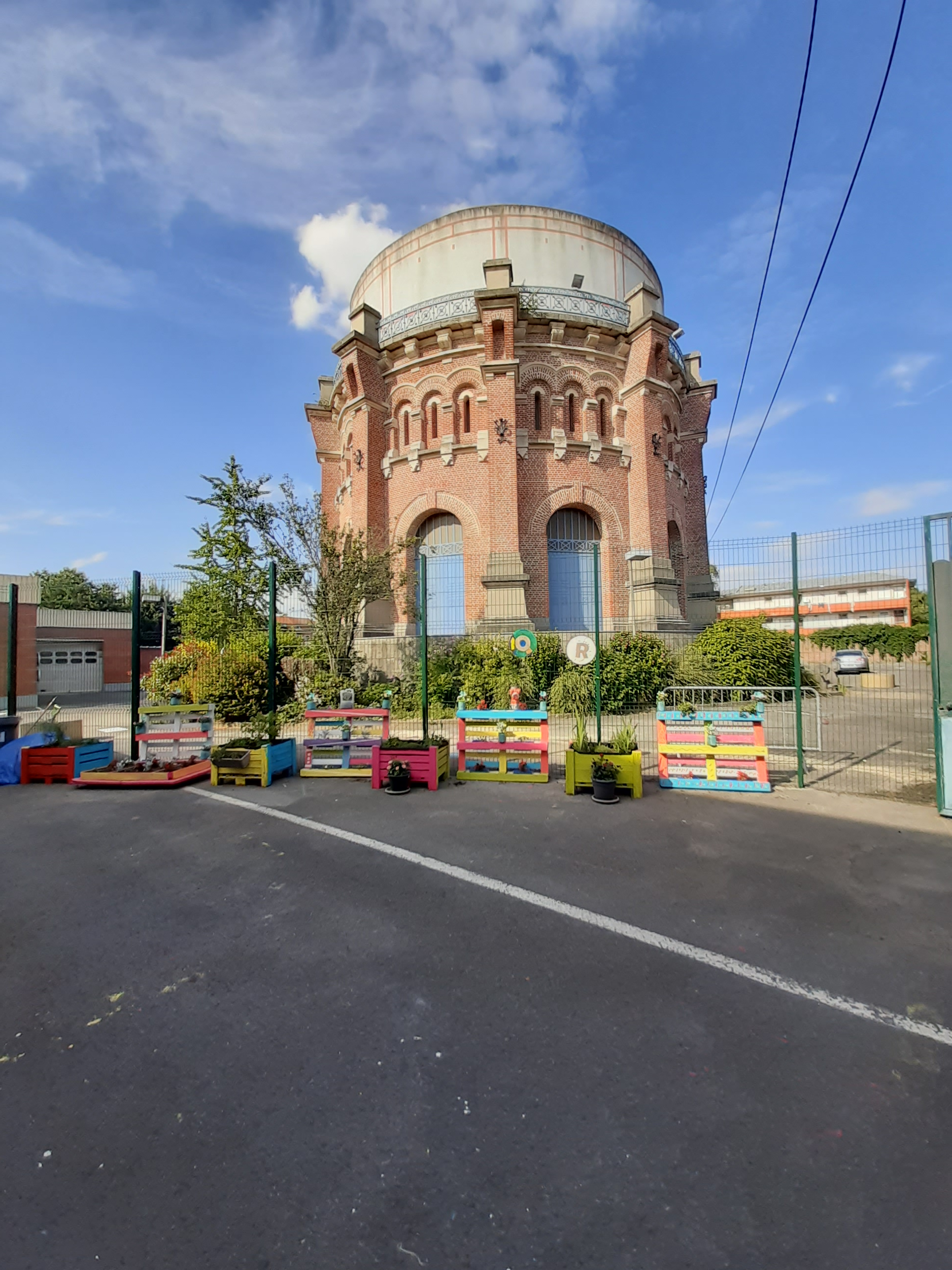 Faubourg de Bethune château d'eau